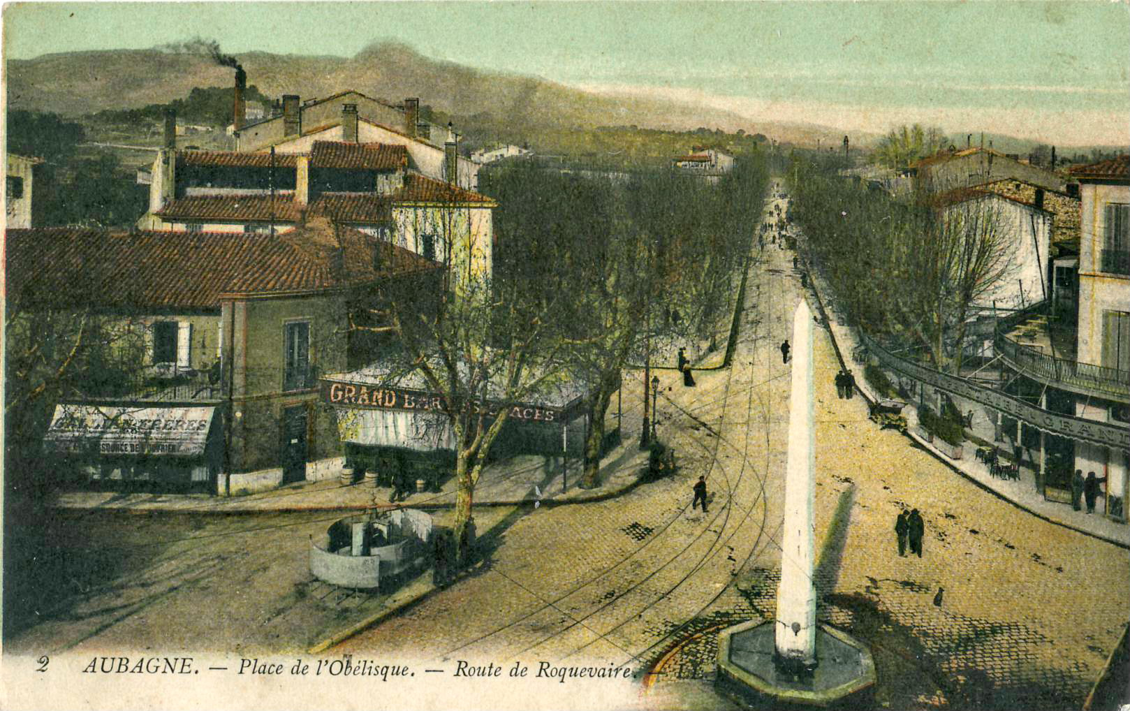 Carte postale ancienne éditée par LL, n°2 :AUBAGNE - Place de l'Obélisque - Route de Roquevaire